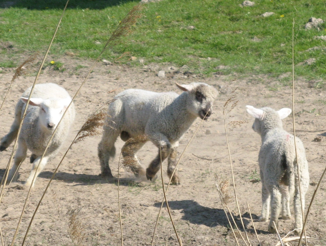 Lambs in Schülp Author: Dirk Ingo Franke